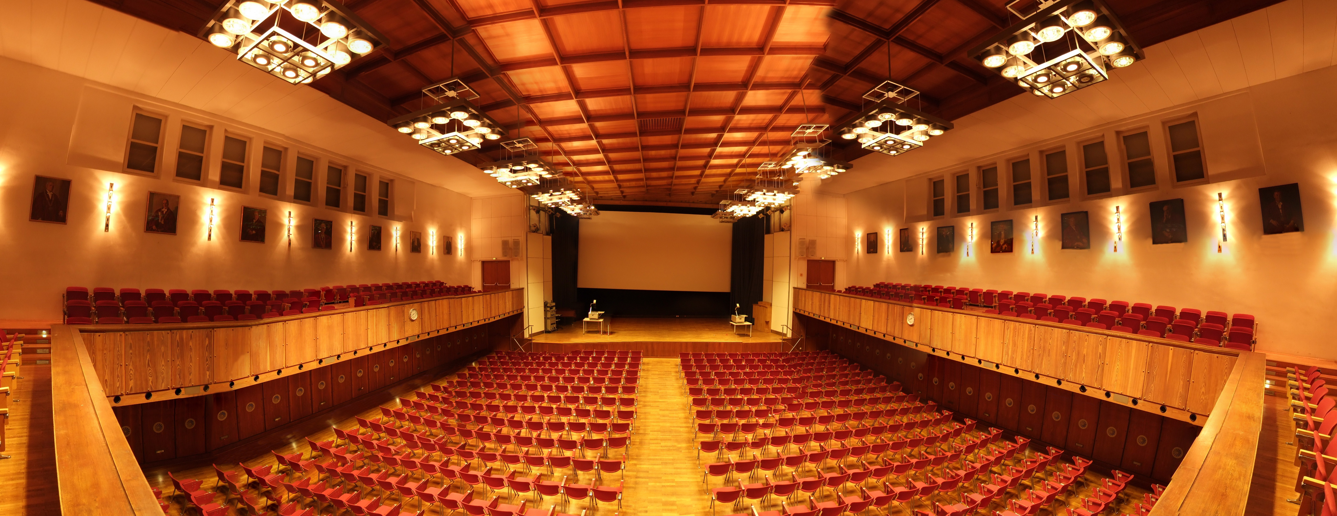 Aula I im Hauptgebäude der RWTH Aachen (Panoramaaufnahme)